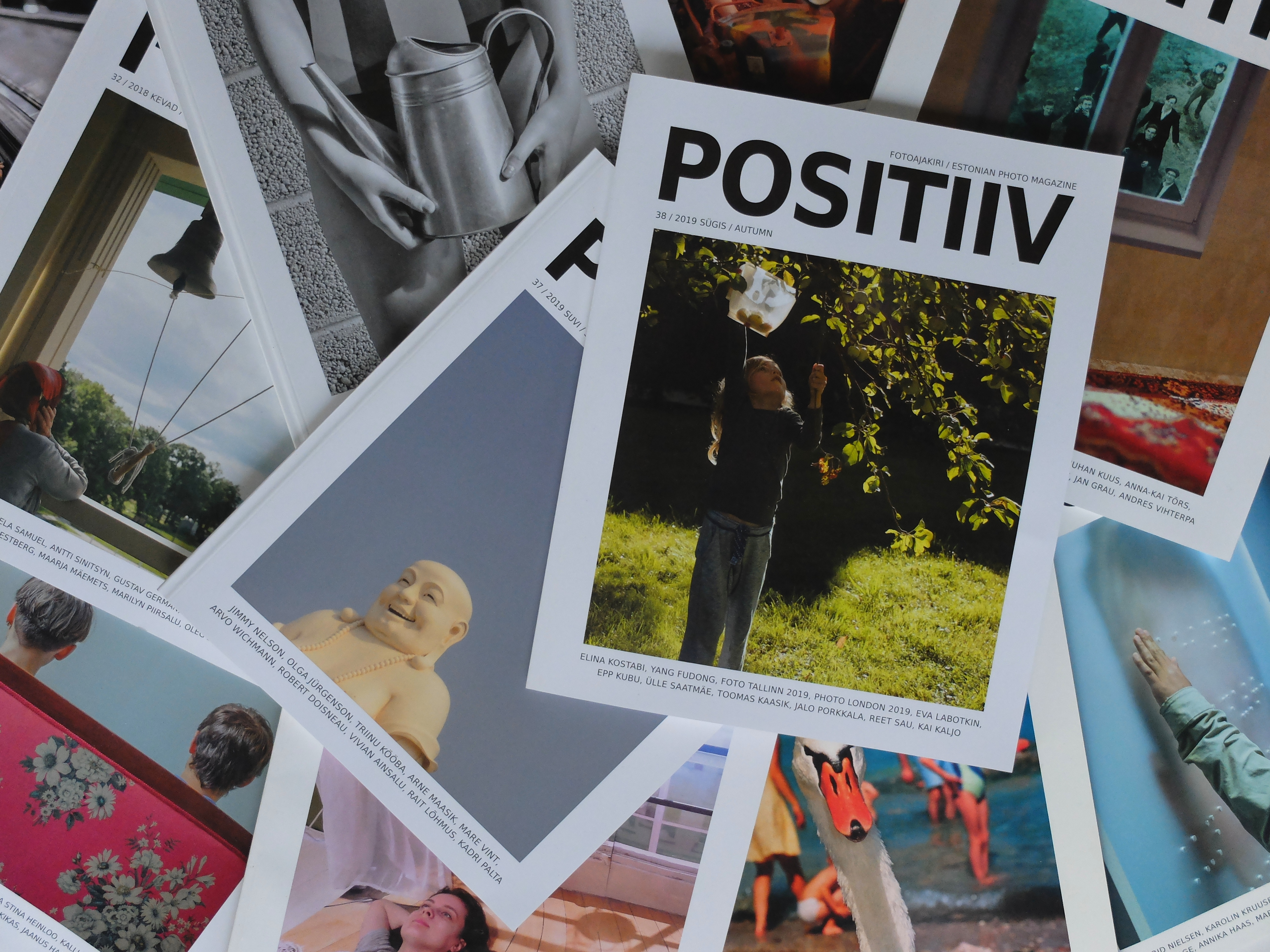 Fotoajakiri Positiiv on ilmunud alates 2010. aastast.